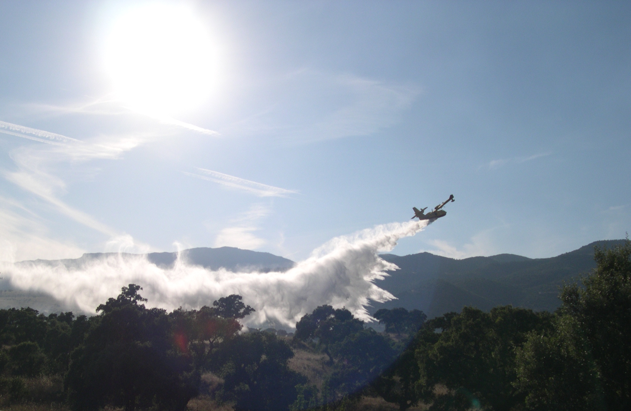 Un Canadair della Protezione civile, su indicazioni dal personale del Corpo Forestale Sardo, interviene su un incendioin Sardegna